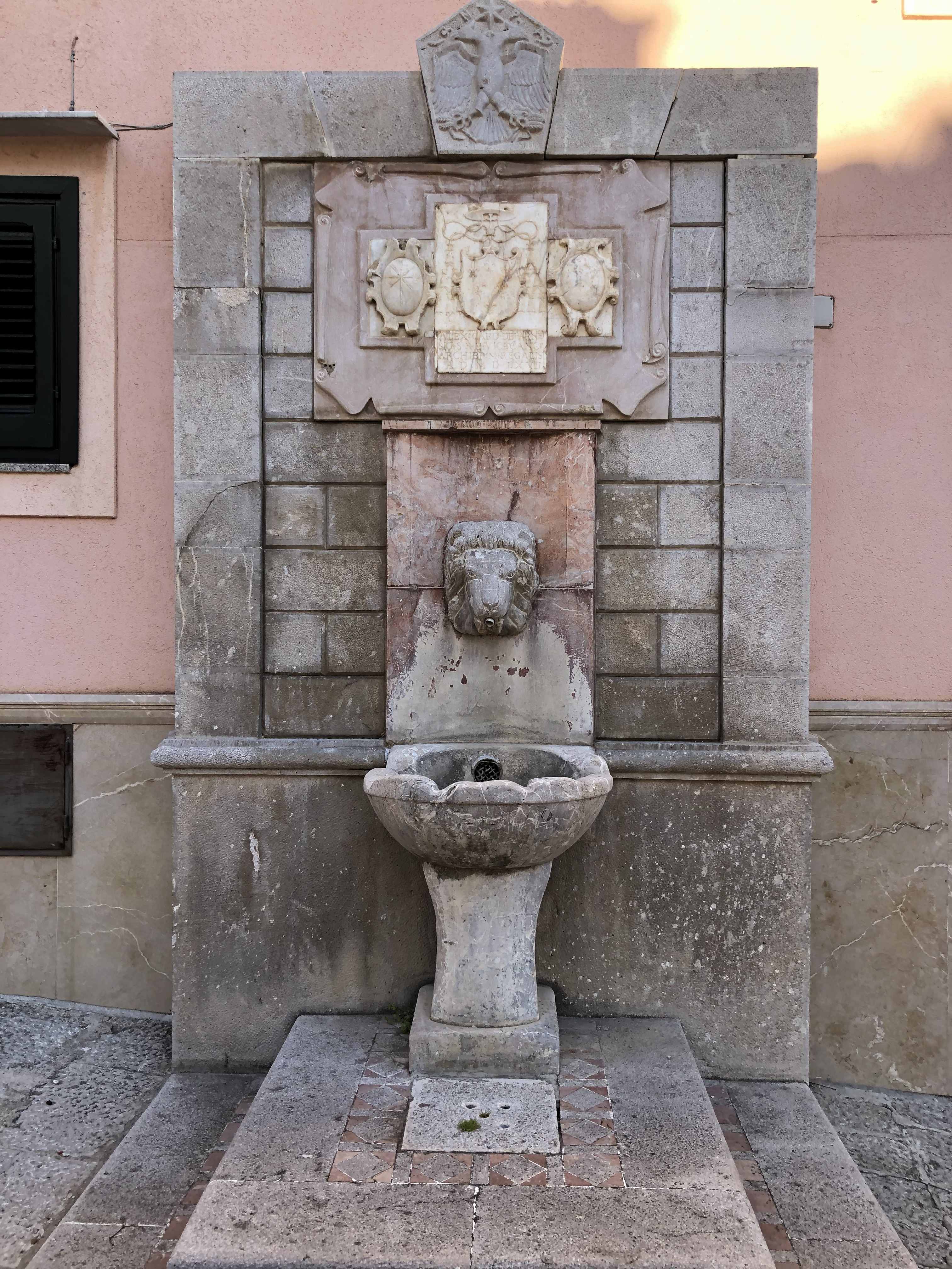 Fontana di Piana degli Albanesi